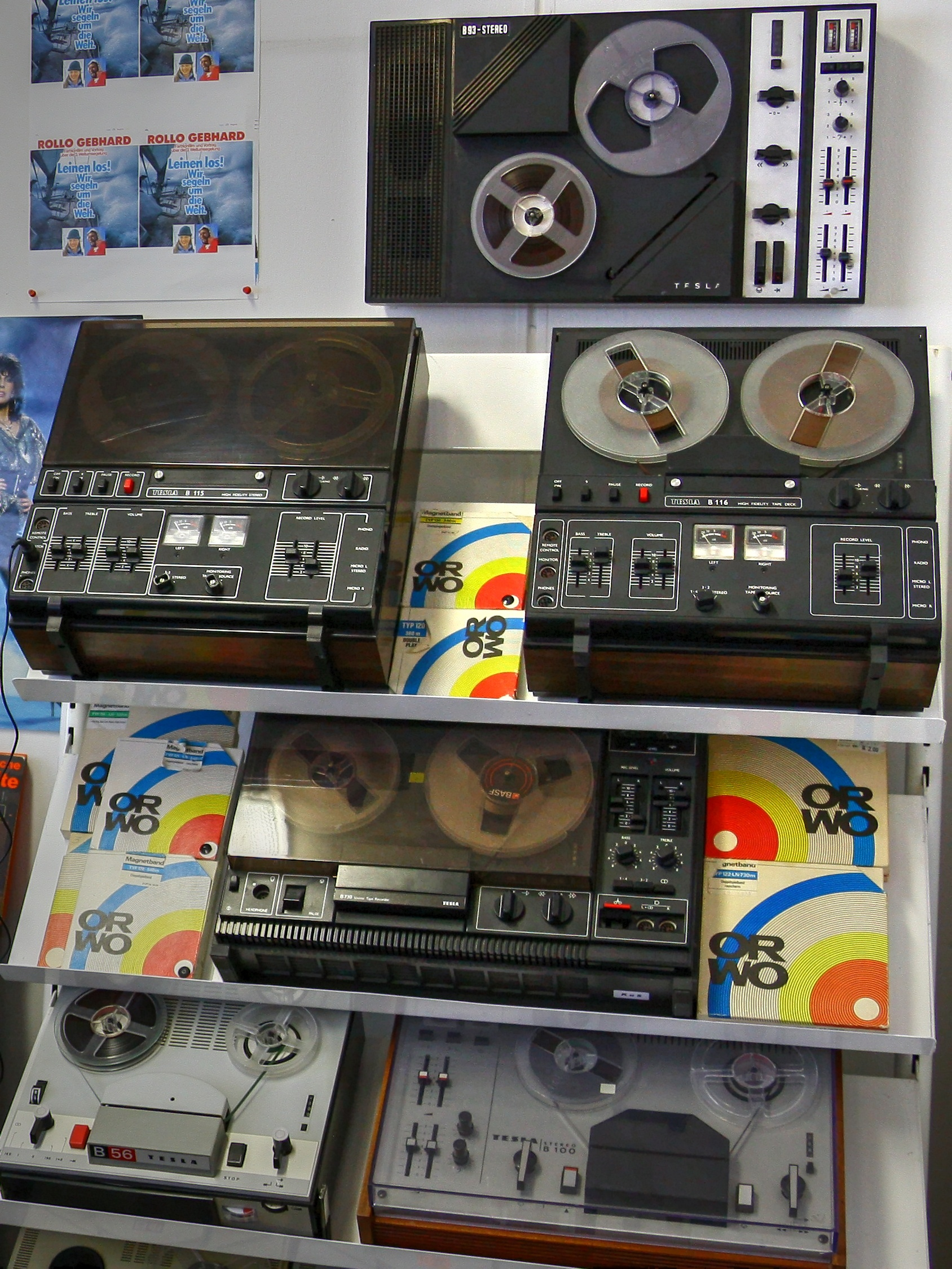 DDR-Museum Zeitreise in Radebeul 2012 - Tesla Tonbandgeräte B93, B115, B116, B730, B56 und B100 mit ORWO-Magnetbändern (1970-1986)